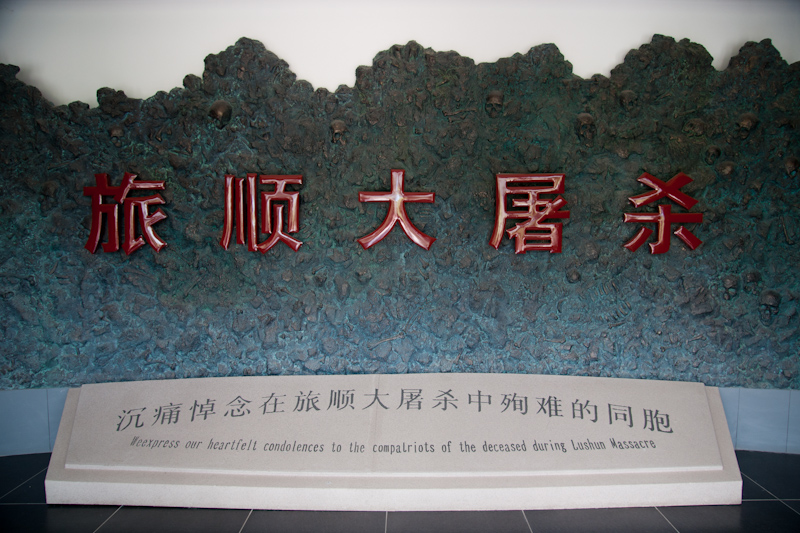 Gedenkstein in der Gedenkstätte des Lüshunkou Massaker. Übersetzung aus dem Chinesischen : "Wir drücken den Landsleuten der Märtyrer des Lüshun Massakers unser tiefschmerzendes Beileid aus"